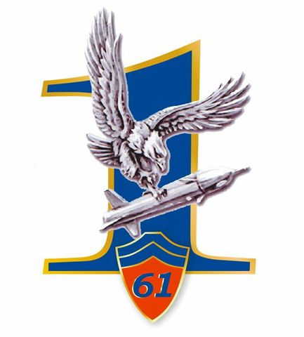 Logo de la 1re Batterie